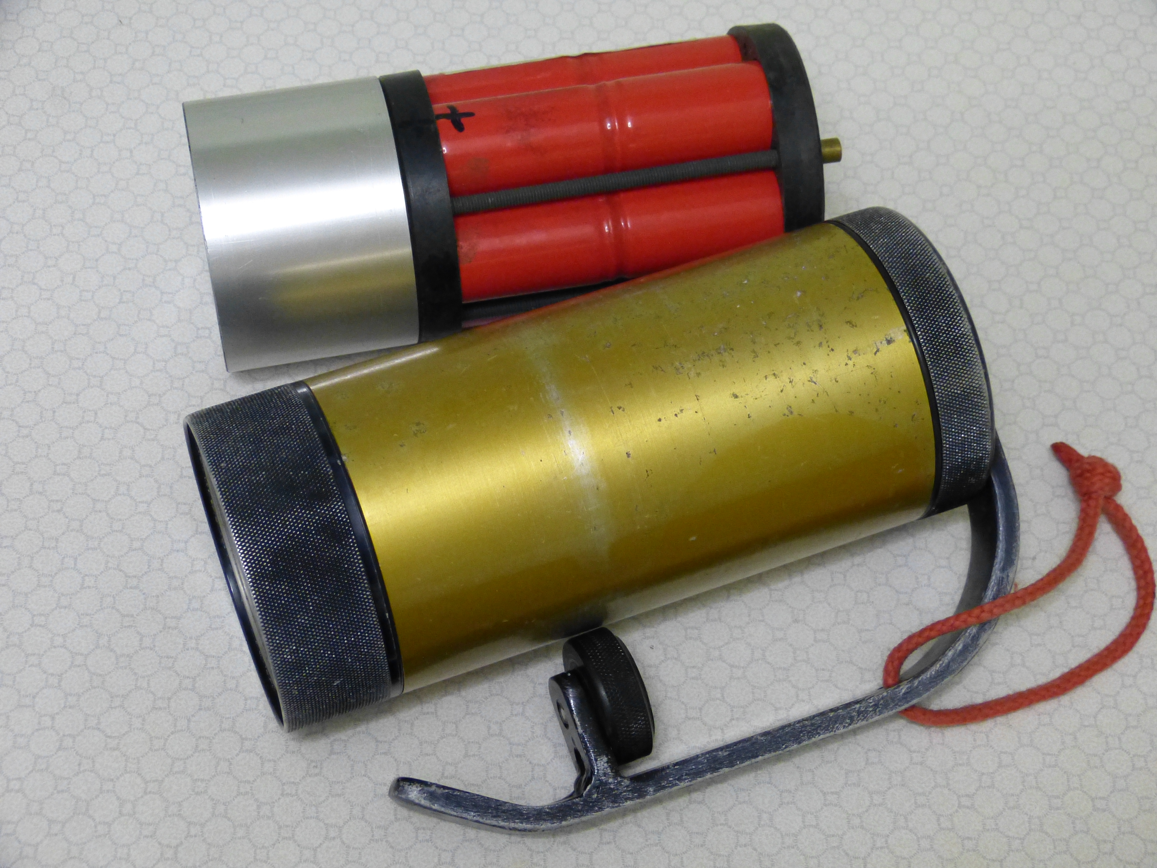 Halogen-Tauchlampe mit Reedschaltung, NiMH-Akkupack nebst Reflektor (Baujahr der Lampe: 1988)